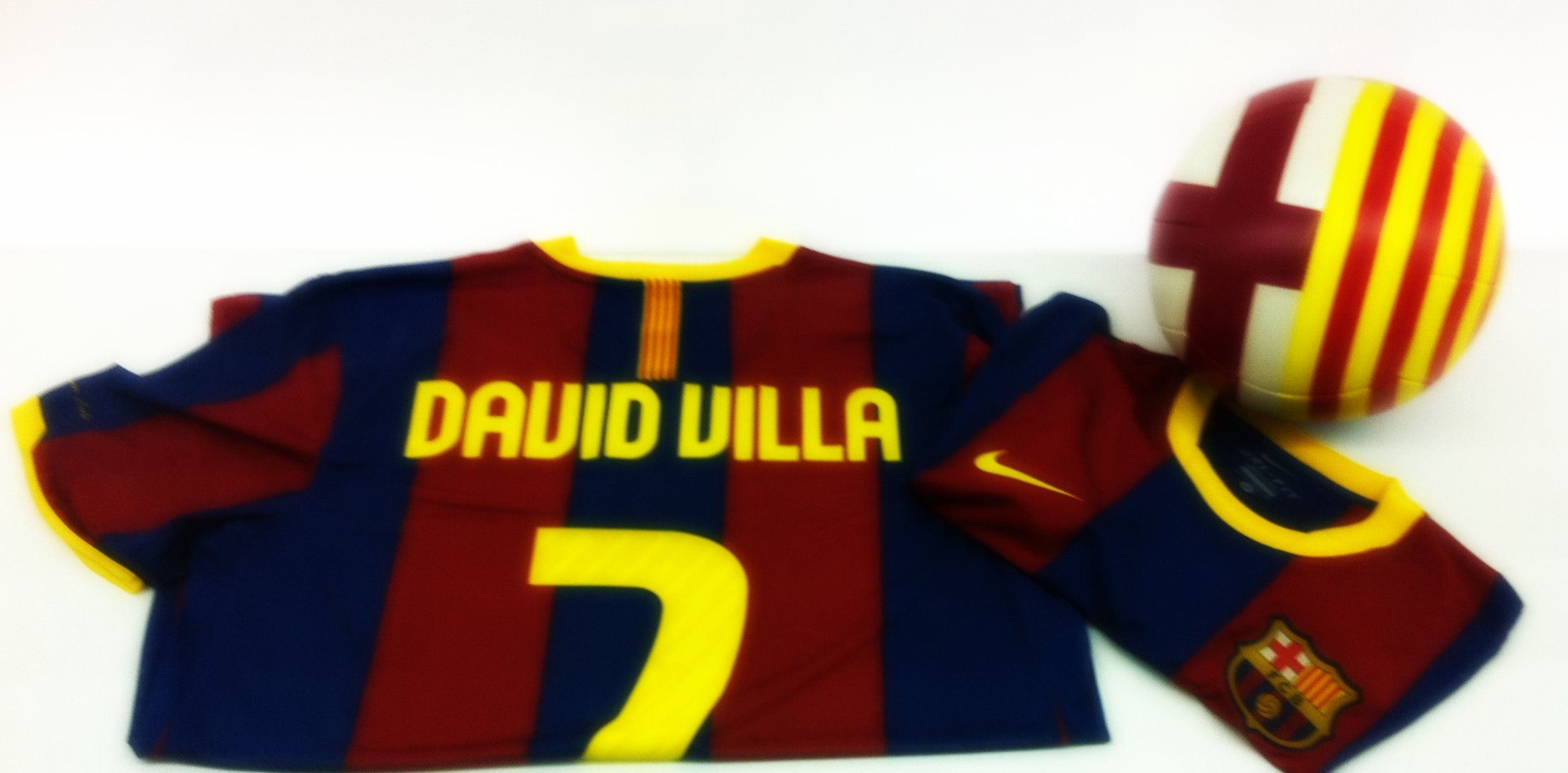 Camiseta de David Villa, en el museo del FC Barcelona.